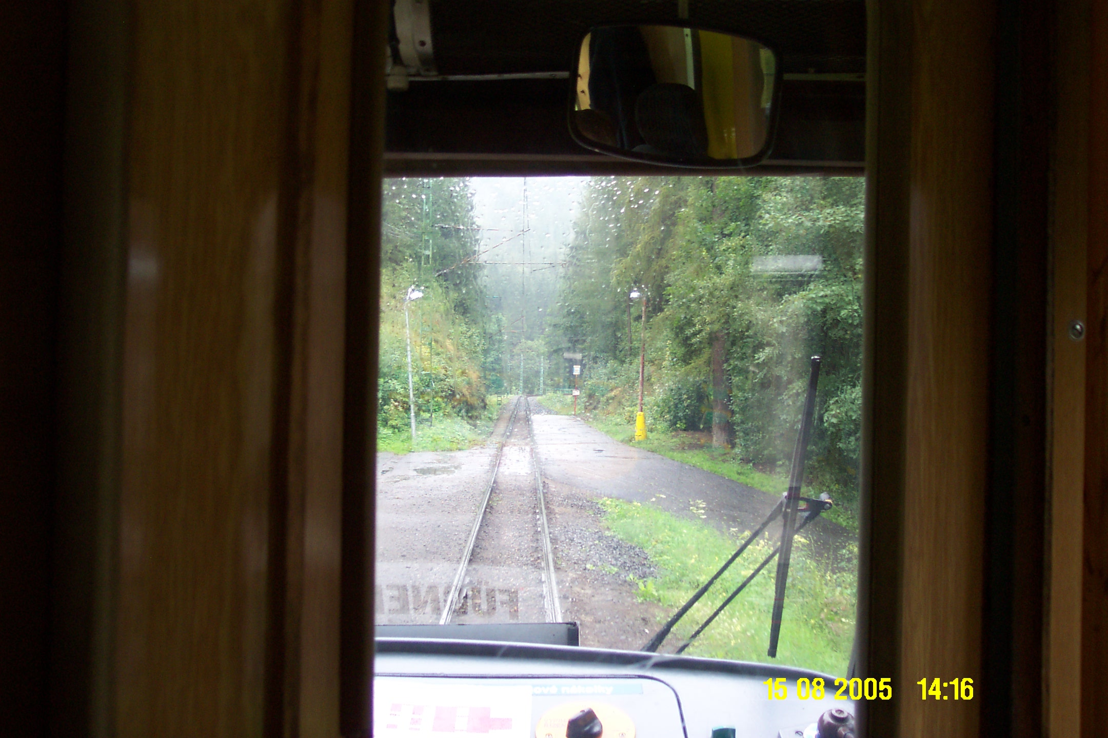 Tramvajová trať Liberec - Jablonec, příjezd do zastávky „Jablonec, Měnírna“ směrem od Jablonce.